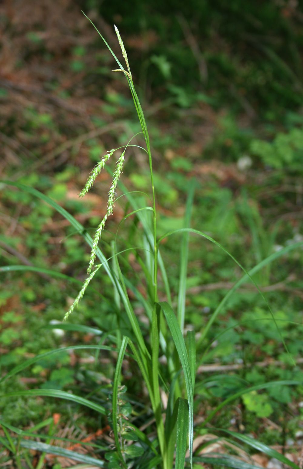 Wald-Segge (Carex sylvatica), Sauergräser (Cyperaceae) - Österreich/Austria/Autriche: Oberösterreich, Hausruckviertel, ca. 2.4 km NE Forsthaus Redltal, ca. 680 m s.m.